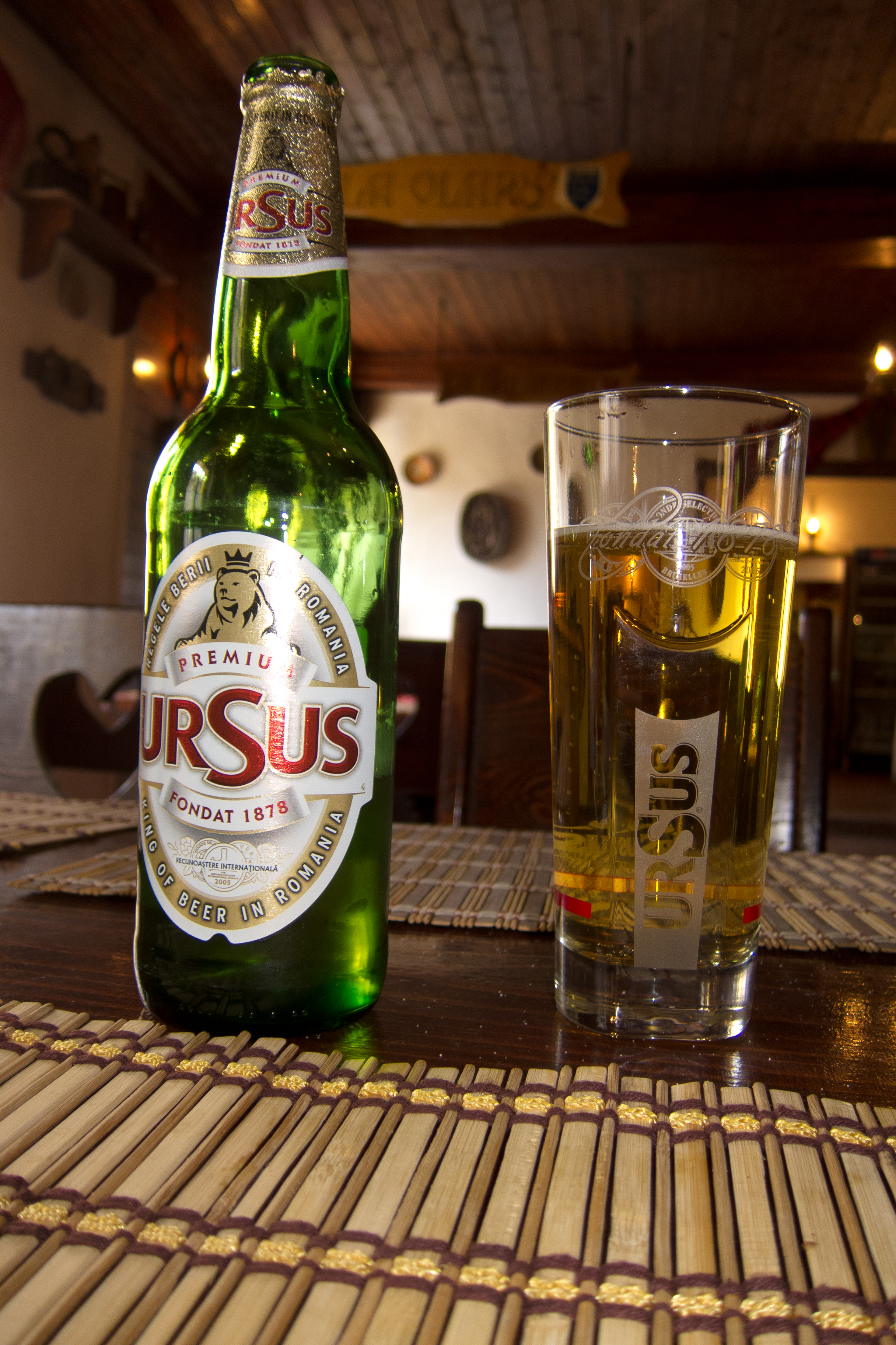 ursus beer